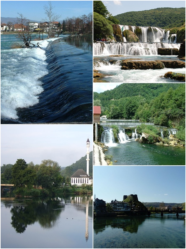 Rijeka Una.